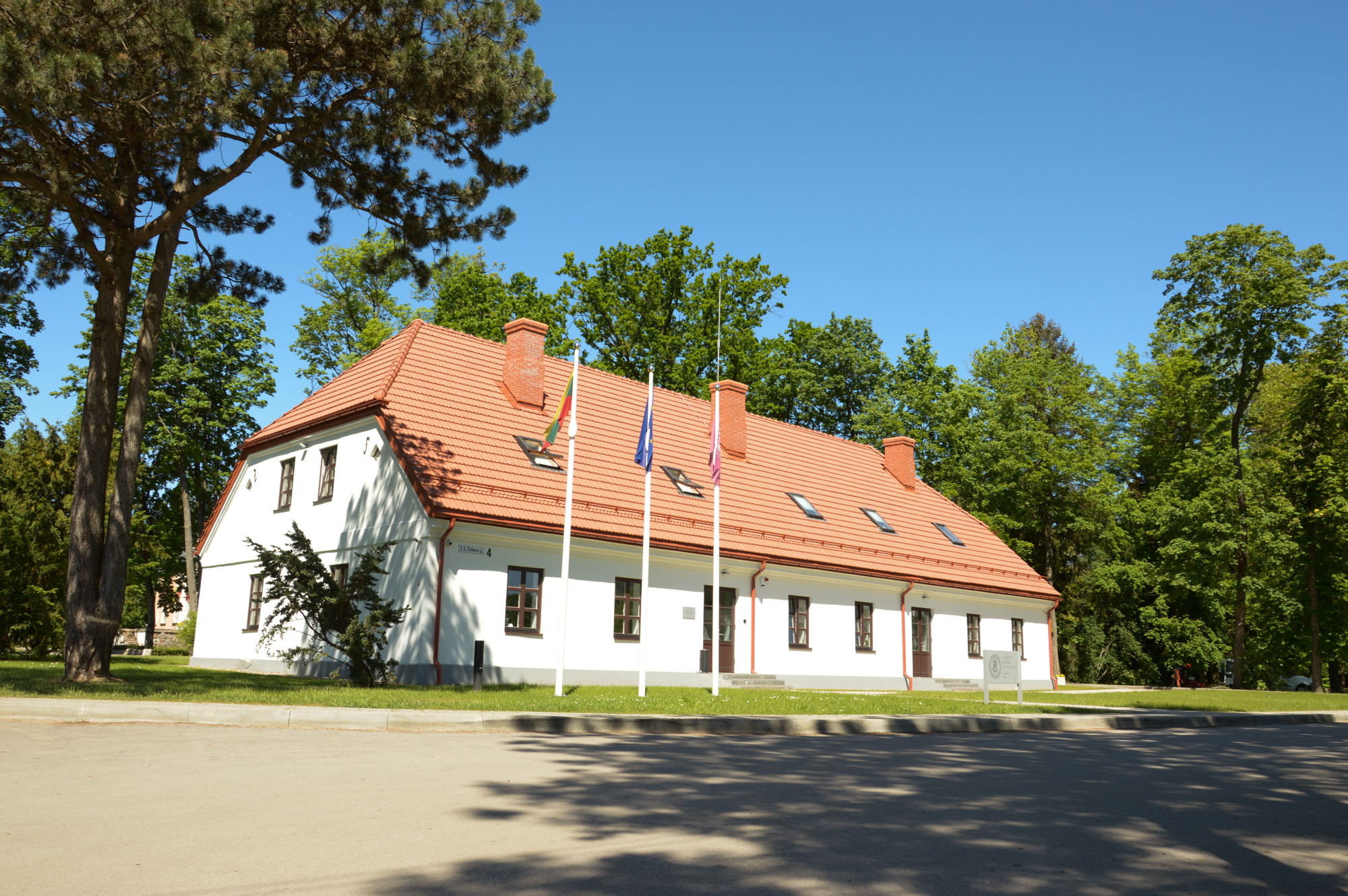 VDU Botanikos sodo administracijos pastatas, 2019 m. Building of VMU Botanical garden administration, 2019